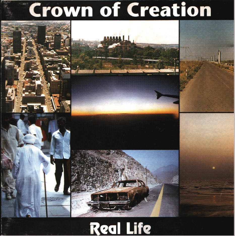 Cover der CD "Real Life" von Crown of Creation (1994)